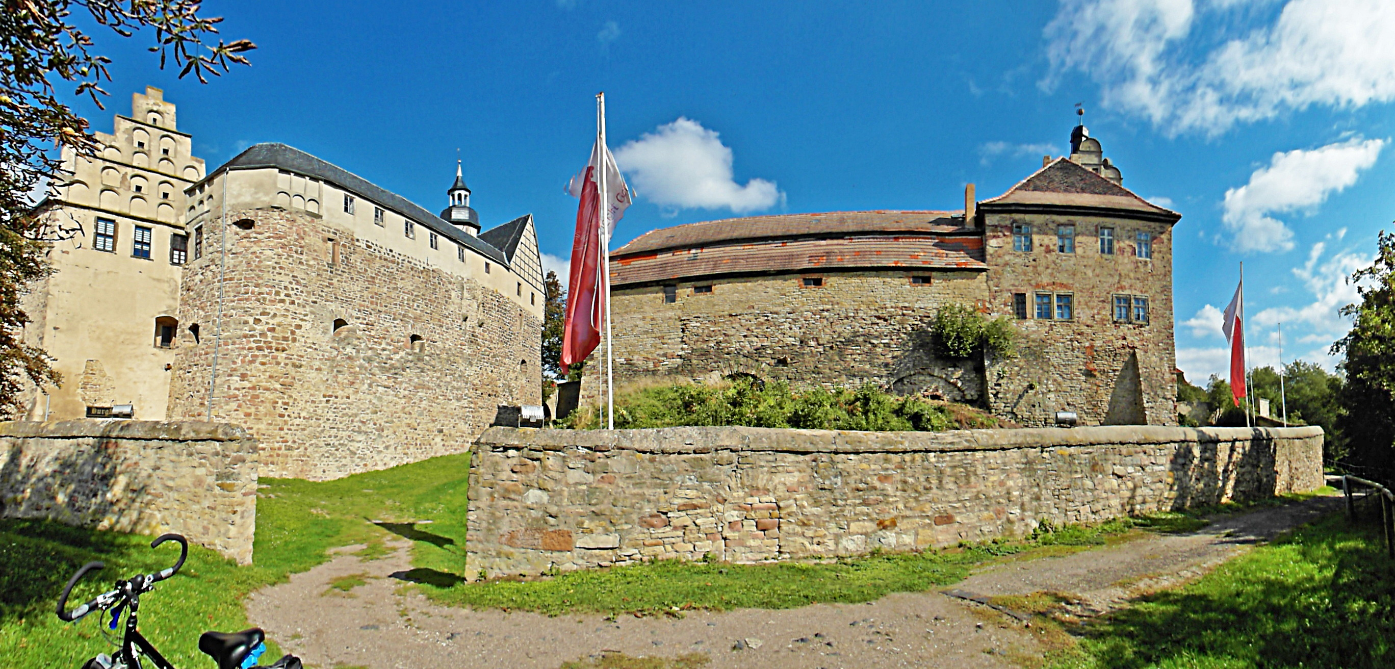 Burg Allstedt von Westen